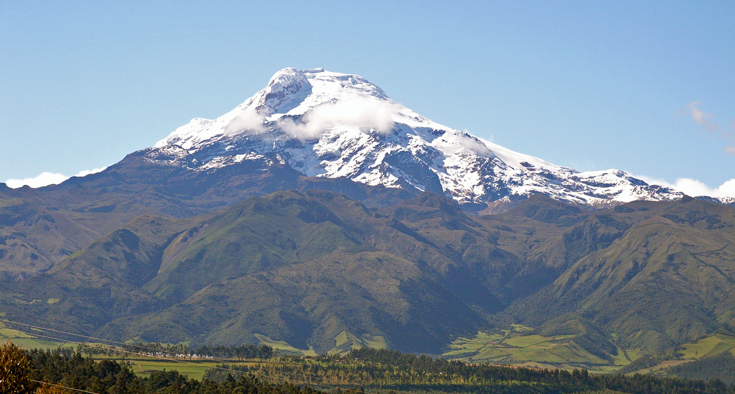 Vulkan Cayambe in Ecuador